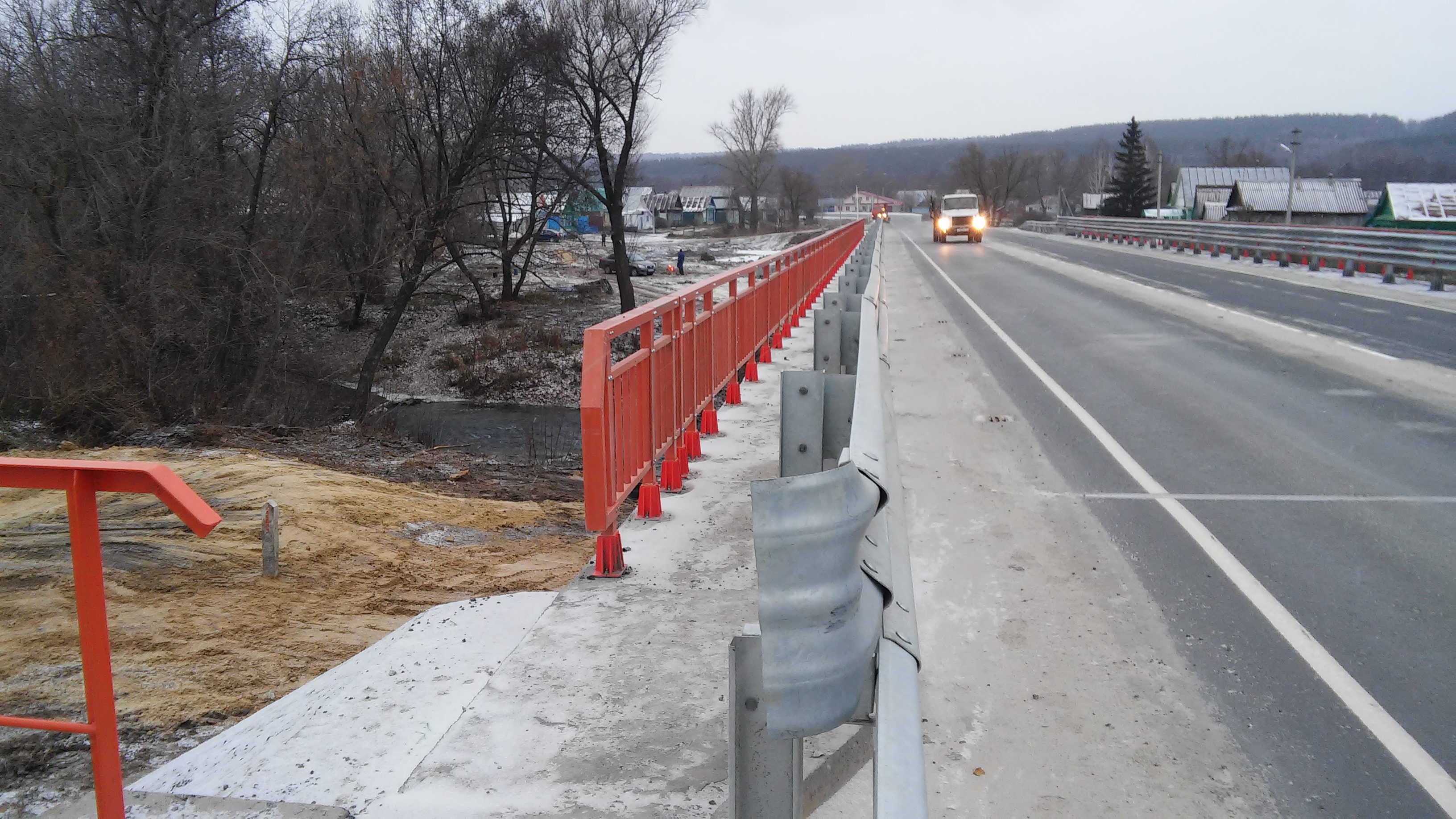 Мост через реку Юловка в селе Архангельское Городищенского района Пензенской области на 698-м километре старого направления автодороги М-5 «Урал».